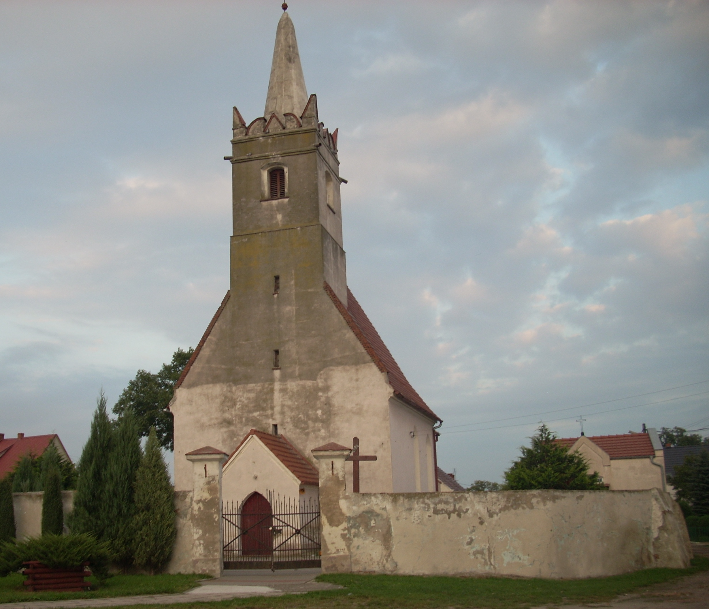 Buszyce, kościół Trójcy Świętej.